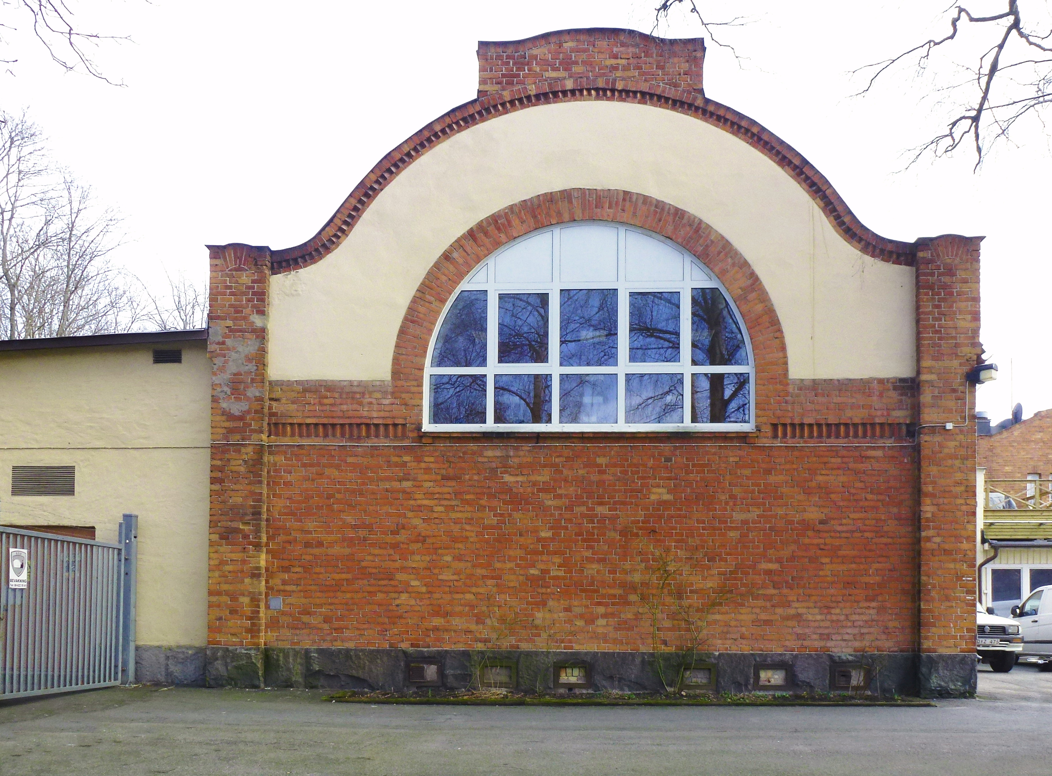 Djursholmsbanans elverk i Stocksunds hamn, byggt 1893 efter ritningar av SiggeCronstedt, idag Marina läroverket